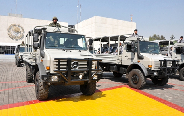 Mercedes Benz Unimog U-4000 perteneciente a la Marina Armada de Mexico